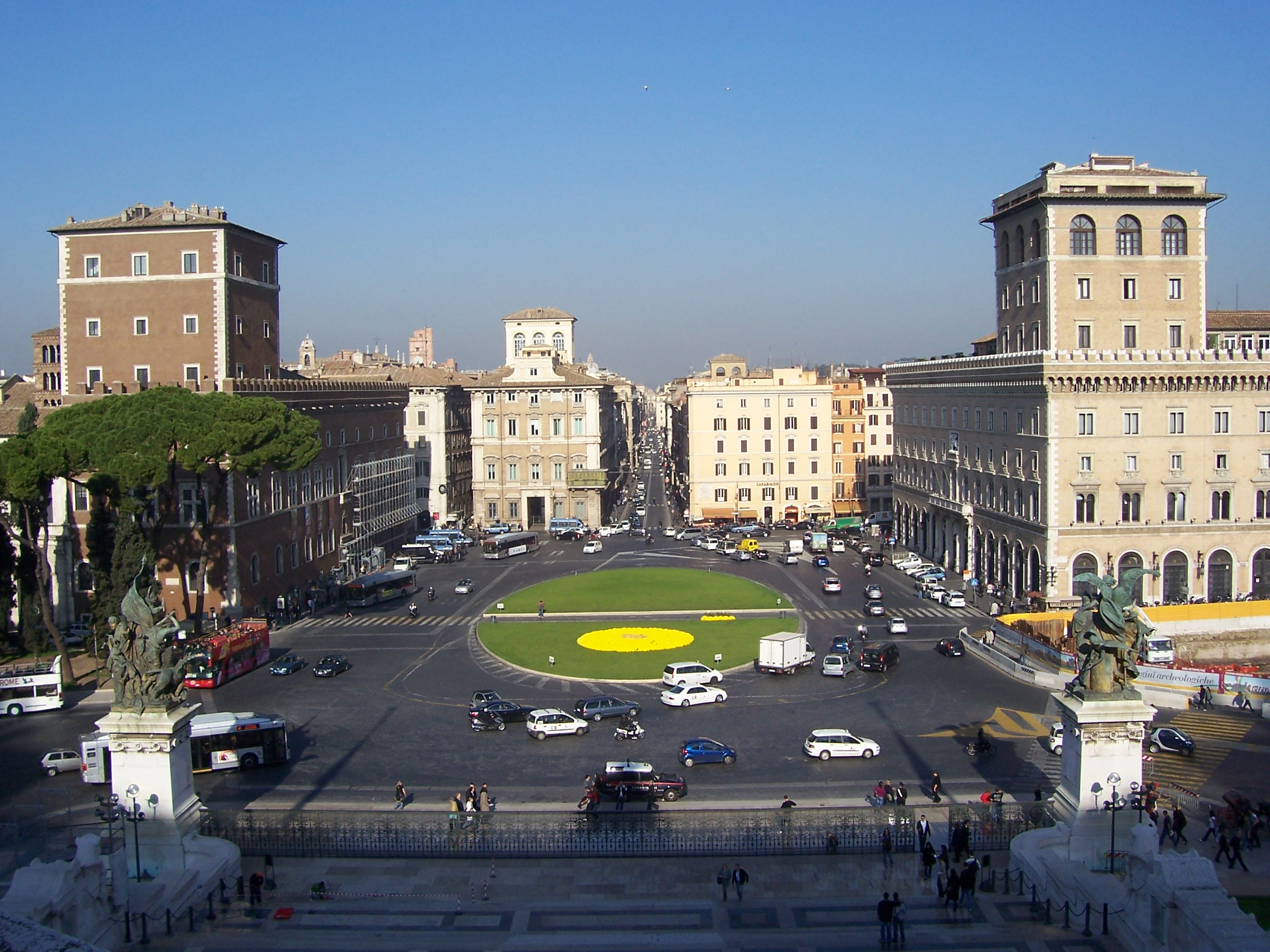 Piazza Venezia a Roma